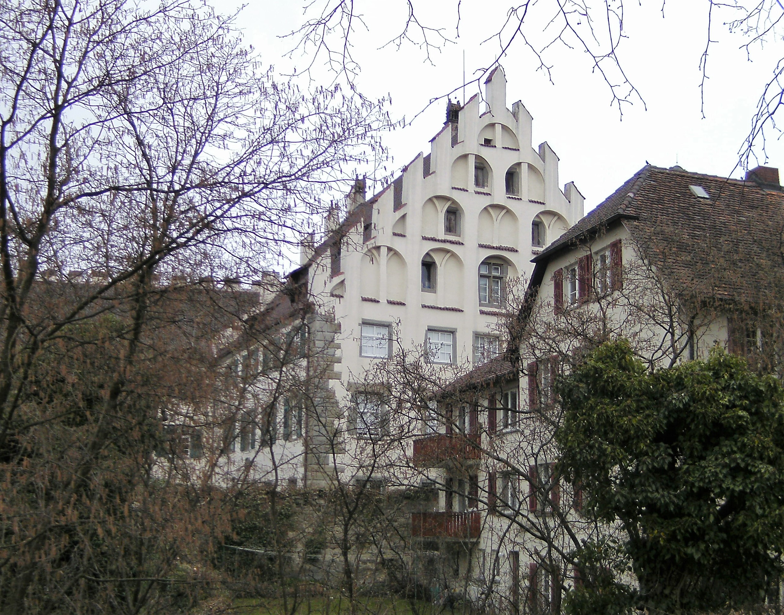 Museum Überlingen